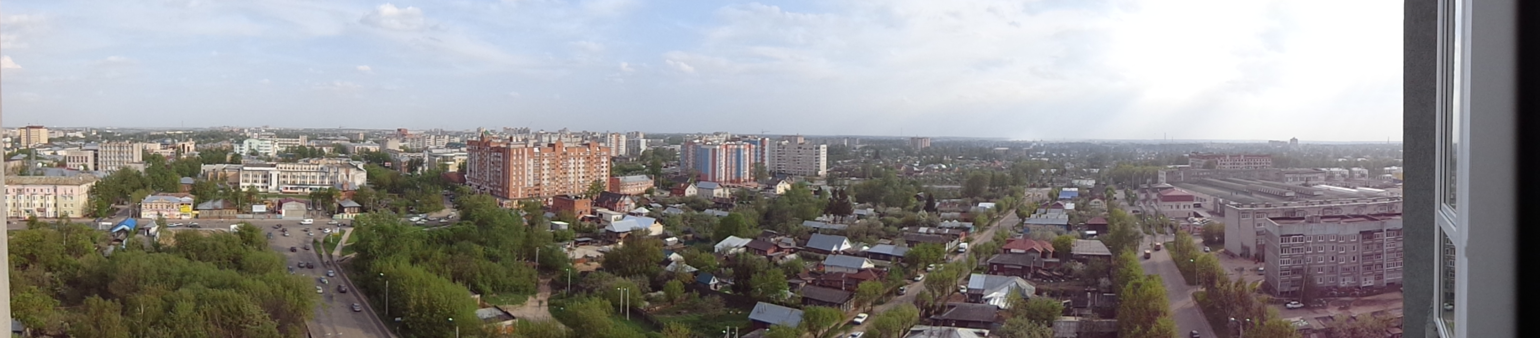 Вид на Рабочий посёлок г.Иванова с 14 этажа здания "Континент-3"